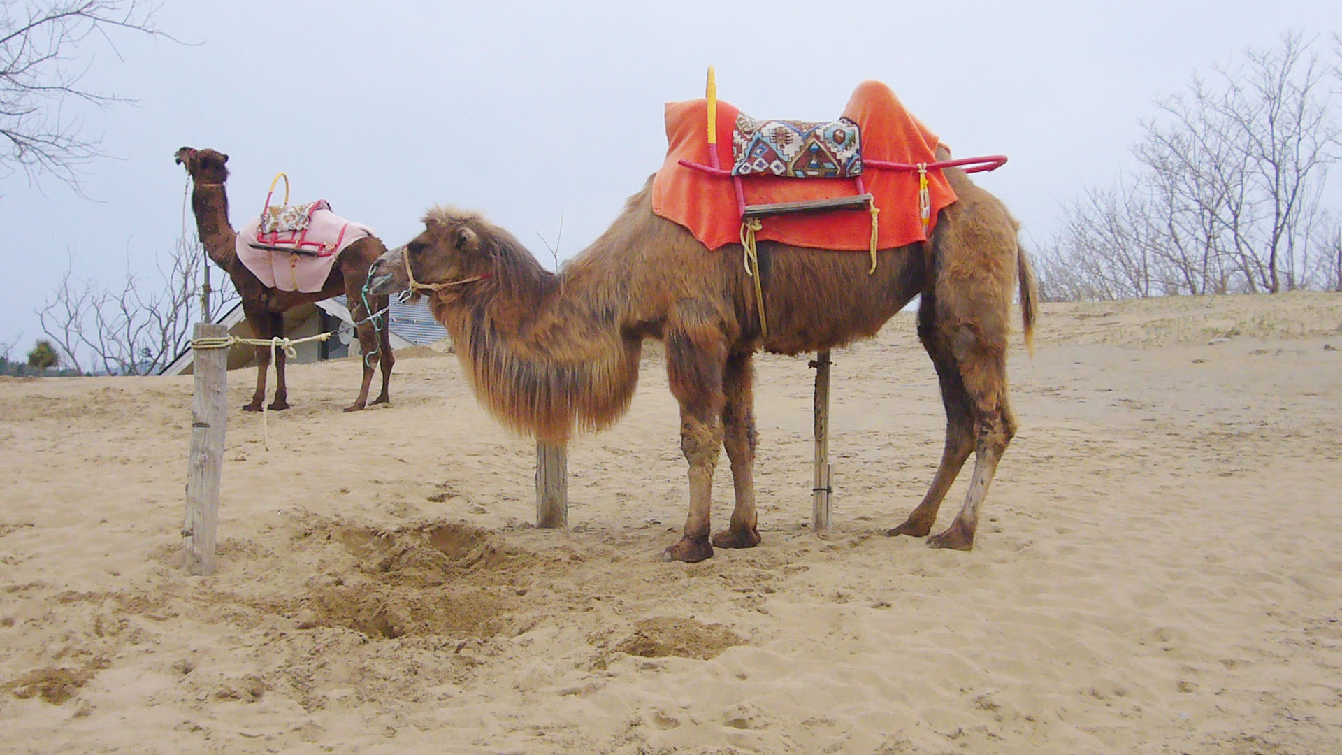 Tottori Sand Dune in Tottori, Tottori prefecture, Japan